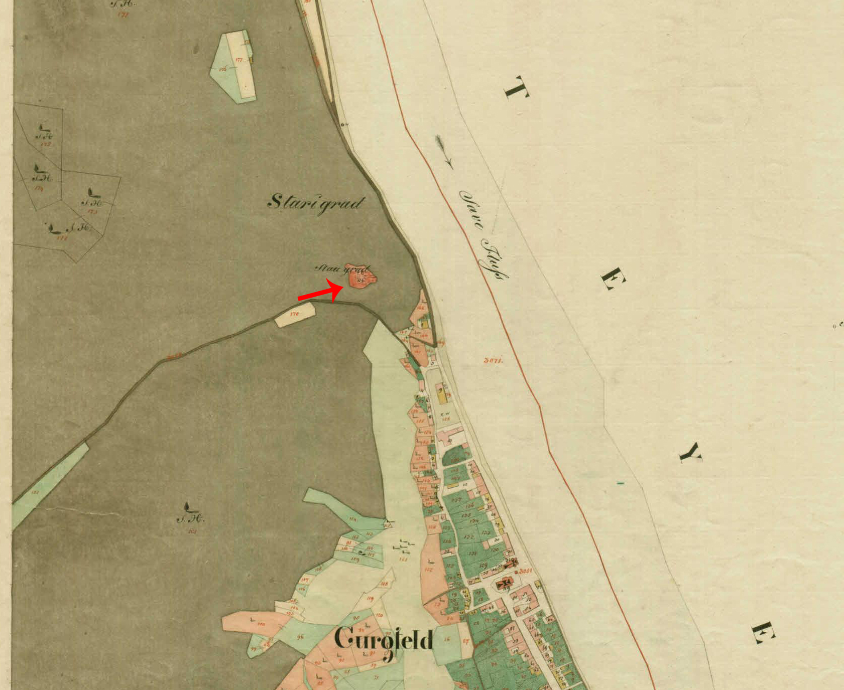 Franciscejski kataster za Kranjsko, 1823-1869